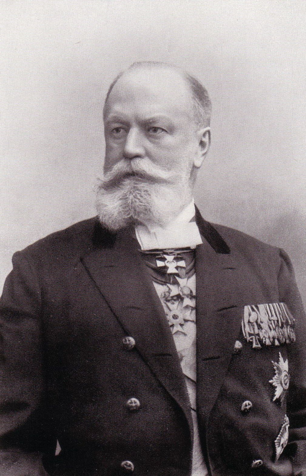 Porträt von Konrad von Studt